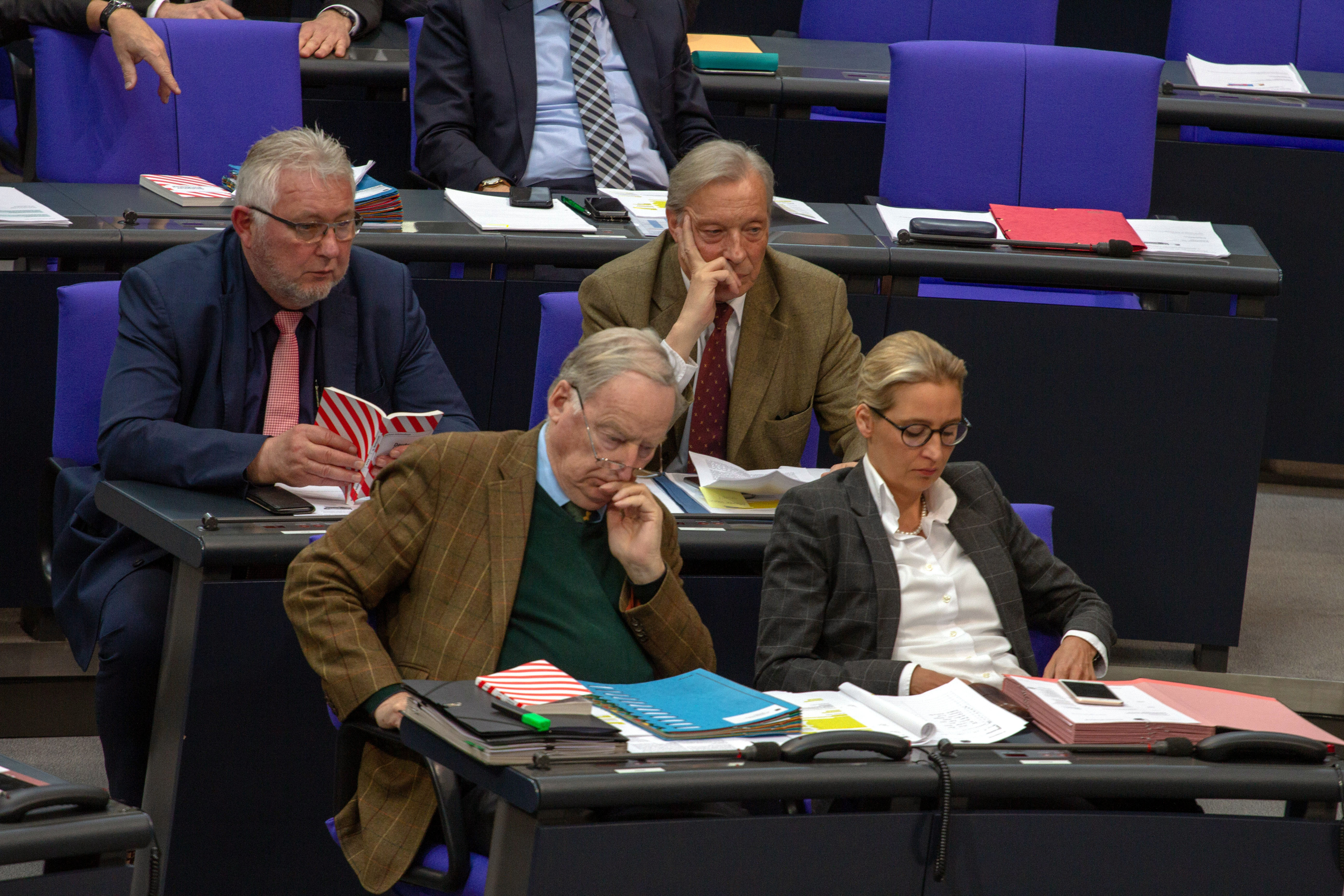 AfD-Bundestagsfraktion, während einer Plenarsitzung im Bundestag am 11. April 2019 in Berlin.